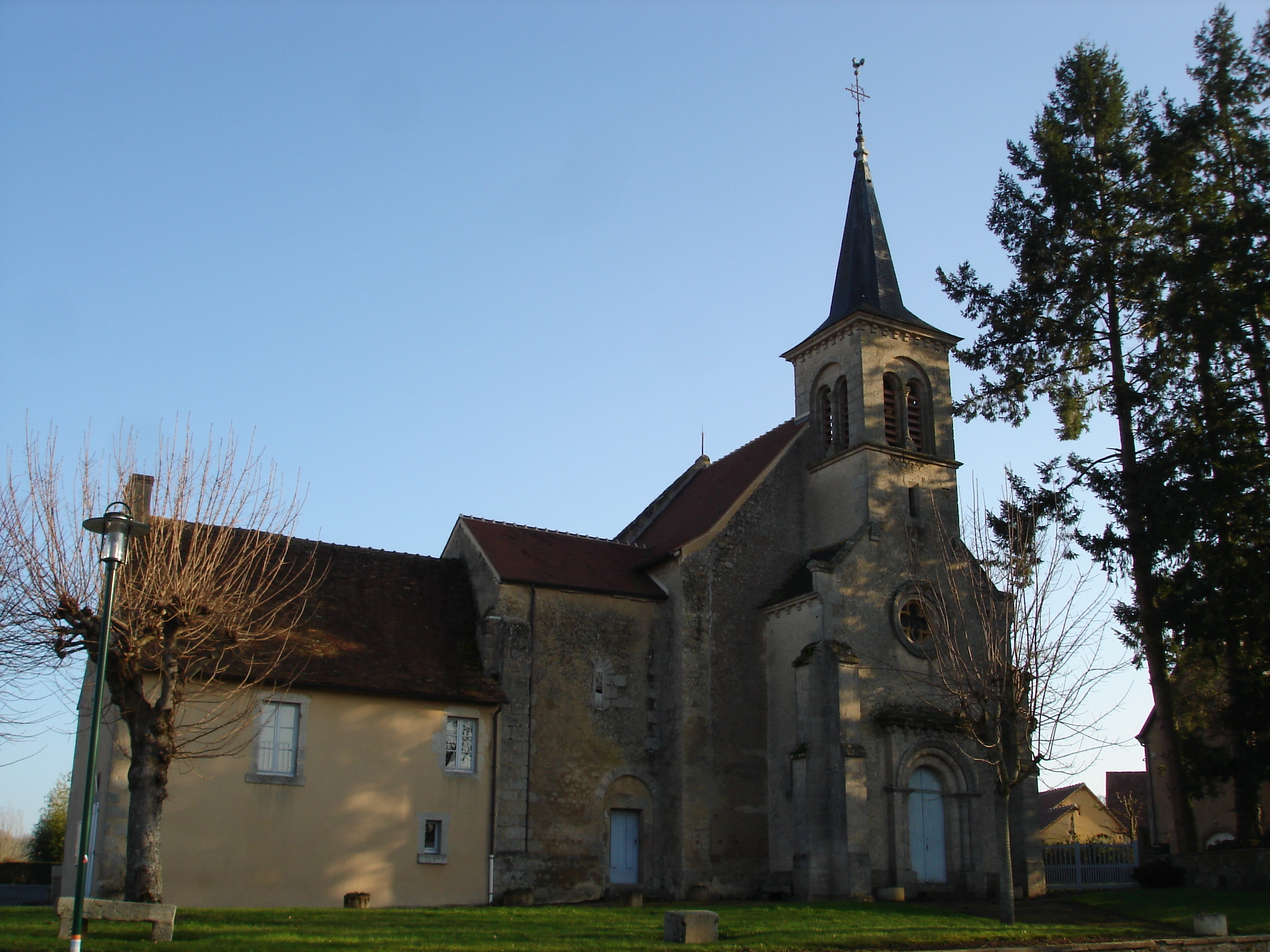 Champillet (36) : L'église Saint-Pierre.